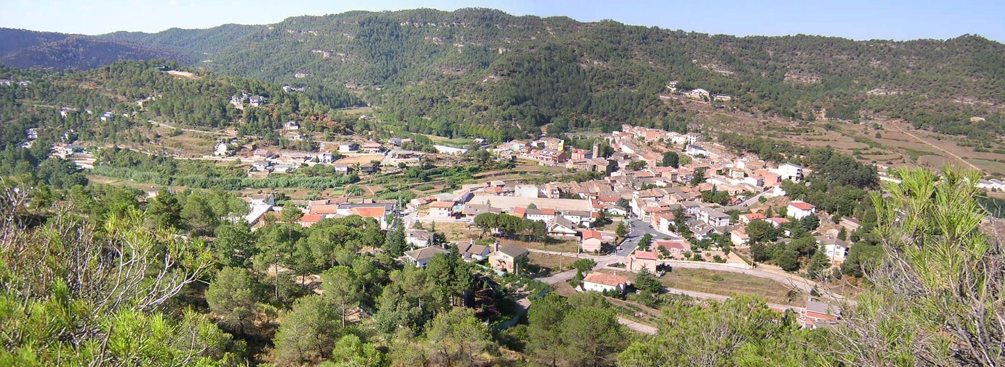 Monistrol de Calders (Moianès)